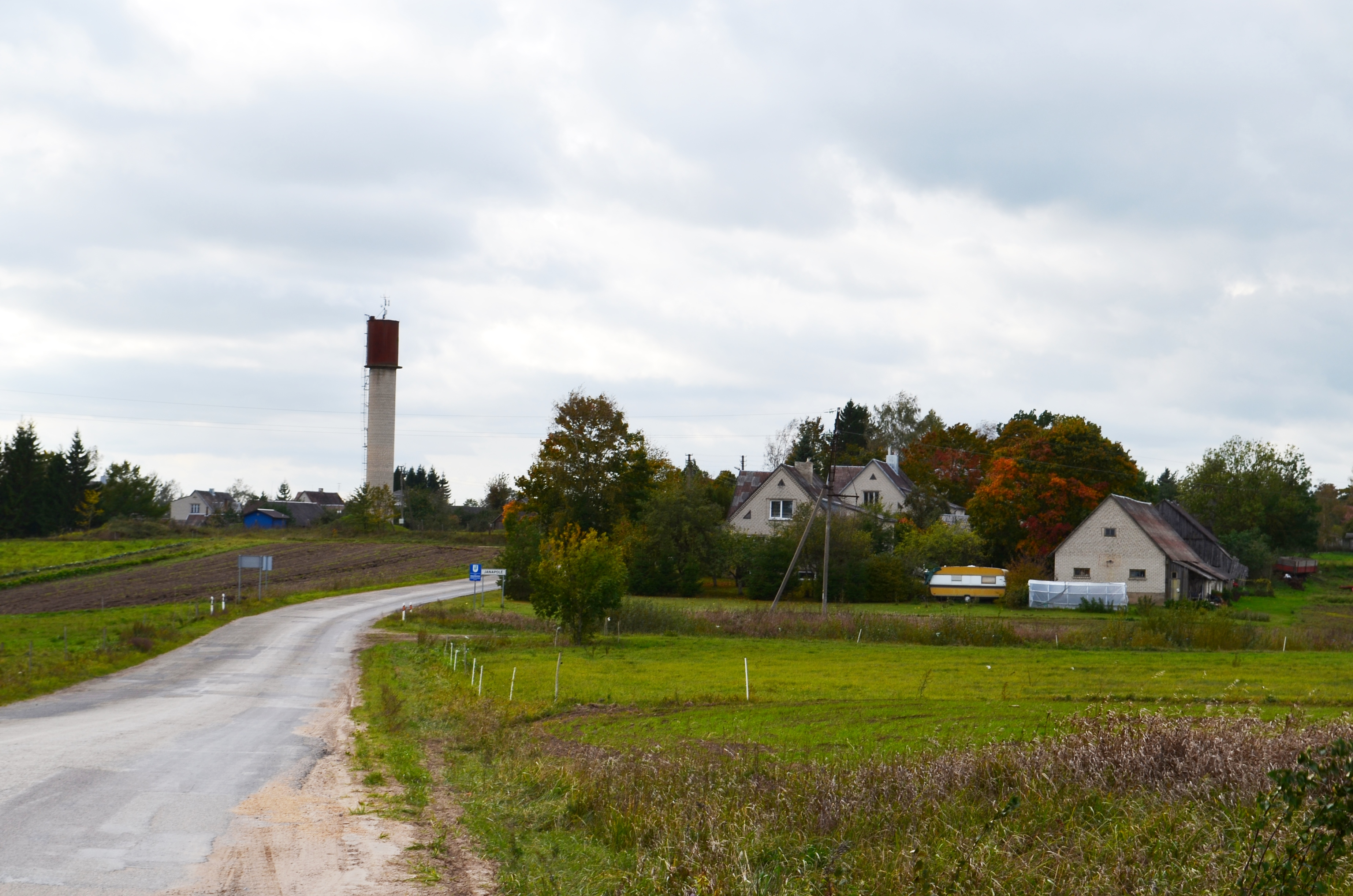 Janapolė atvažiuojant nuo Pavandenės, Telšių raj.